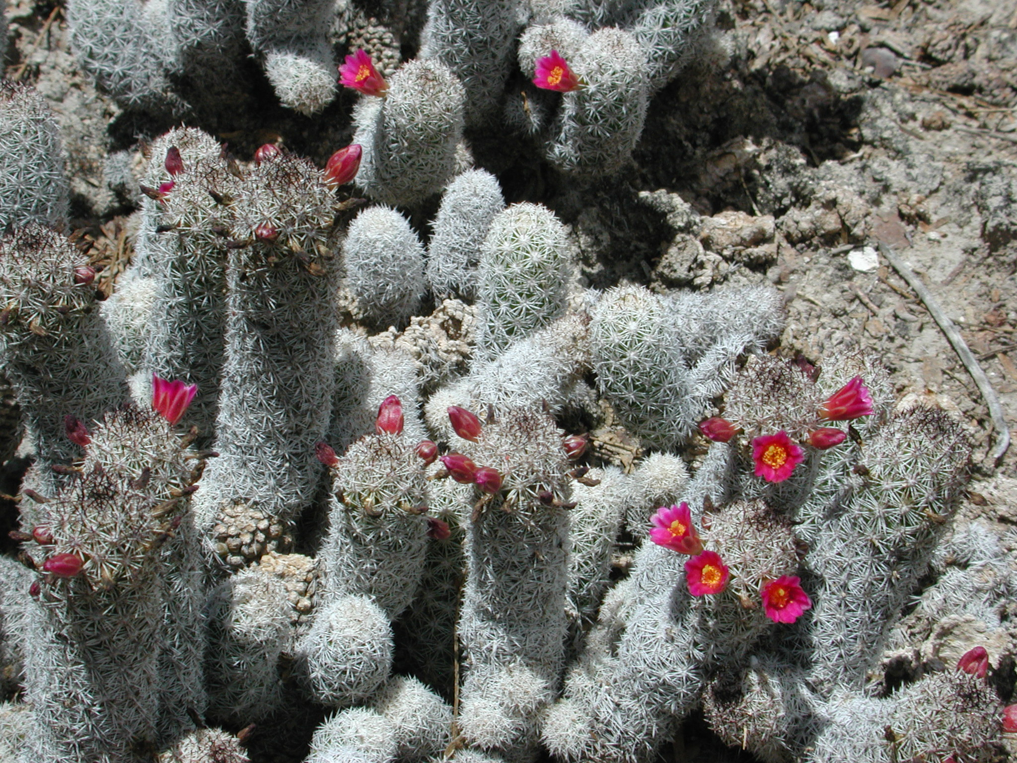 Mammillaria sphacelata ssp.viperina Mammillaria viperina, own work